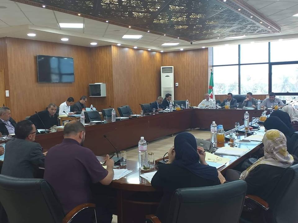 Réunion du conseil municipal de Chlef en Avril 2019